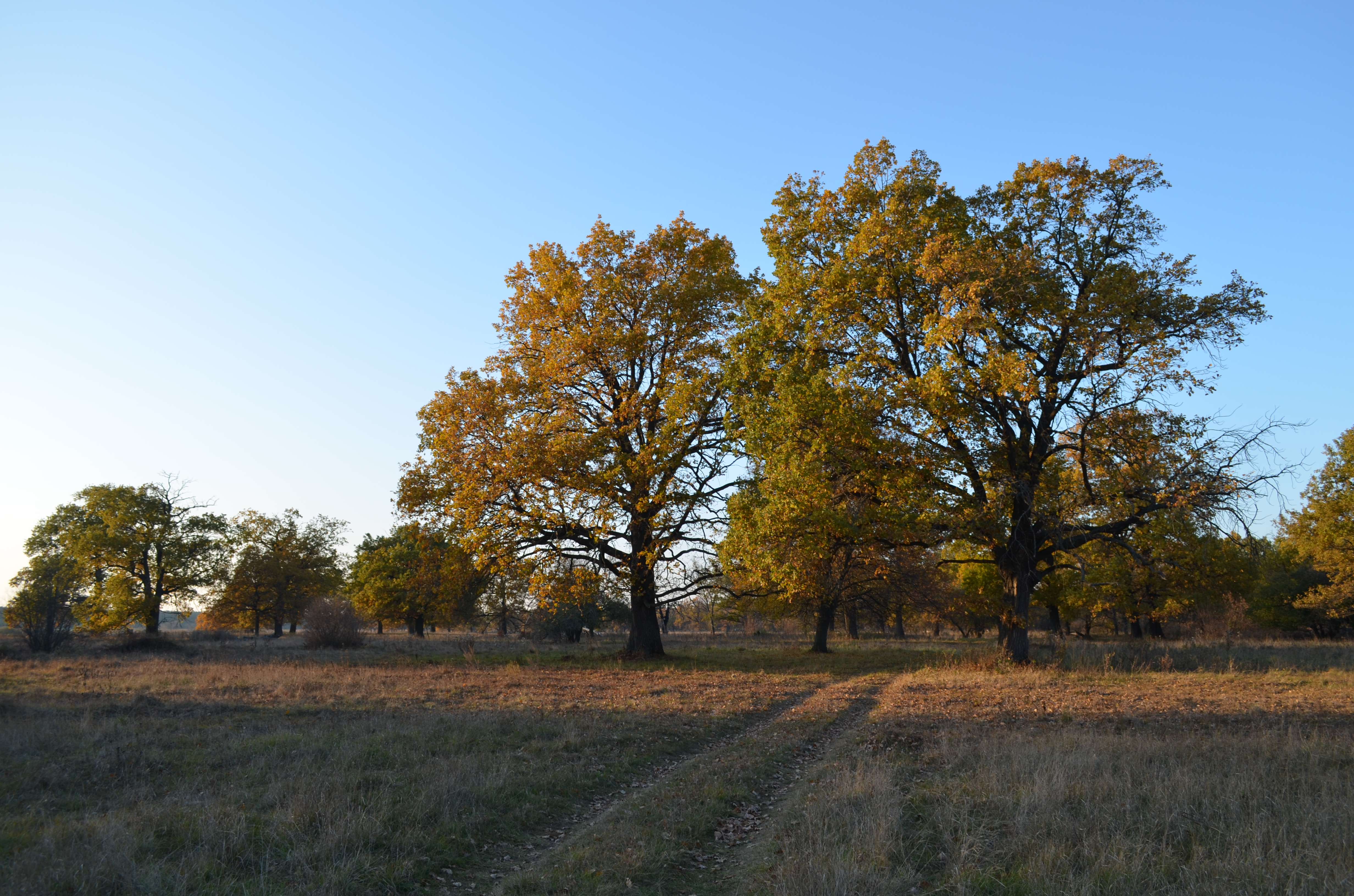 Дубовая роща близ села Коростово Рязанской области.